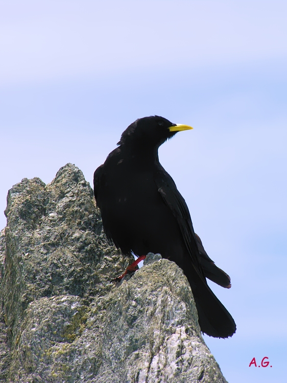 Gracchio - Alpi Graie - Italy